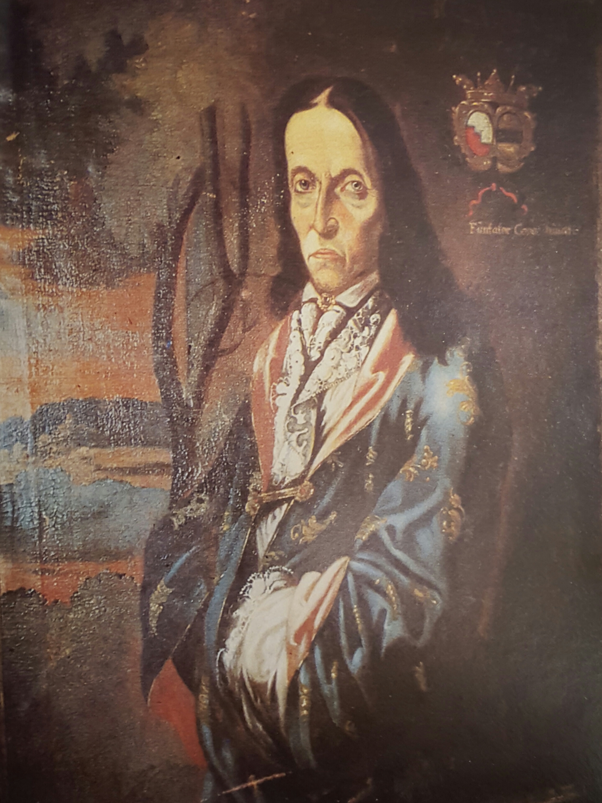 Bildnis von Johann Georg, Graf von Seiboldsdorf (1628 - 1699). Am rechten oberen Bildrand stehen die Buchstaben IG.G.V.F.S.VZL, darunter Aetalis h. LXX. Unter dem Wappe steht Funtator Coop, huiatis. Das heißt: Johann Georg von freien Seiboldsdorf Videcominus zu Landshut, in seinem 70. Jahr, Gründer der hiesigen Cooperatur